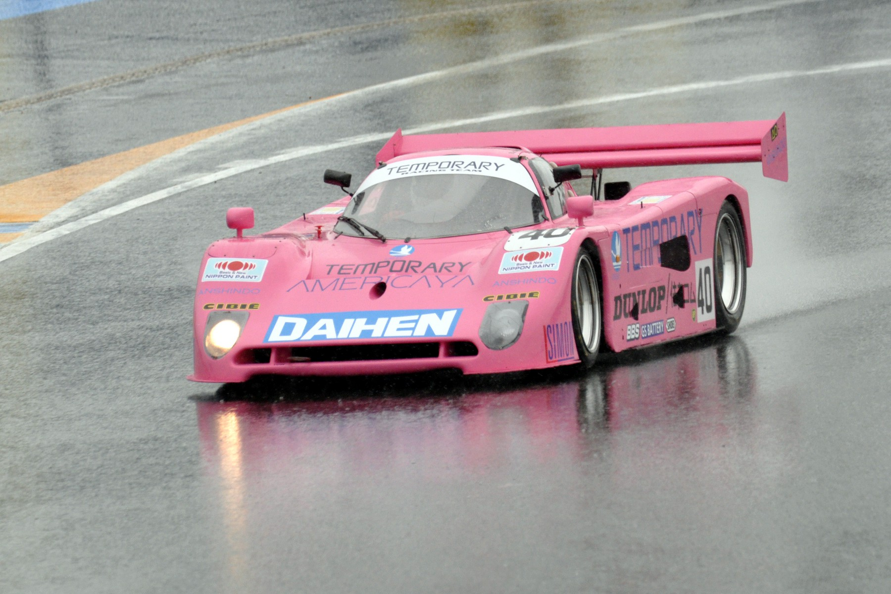 Spice SE90C - Ford de l'écurie Euro Racing ayant participée aux 24 Heures du Mans 1991 avec comme pilote Lyn St. James, Desiré Wilson et Cathy Muller